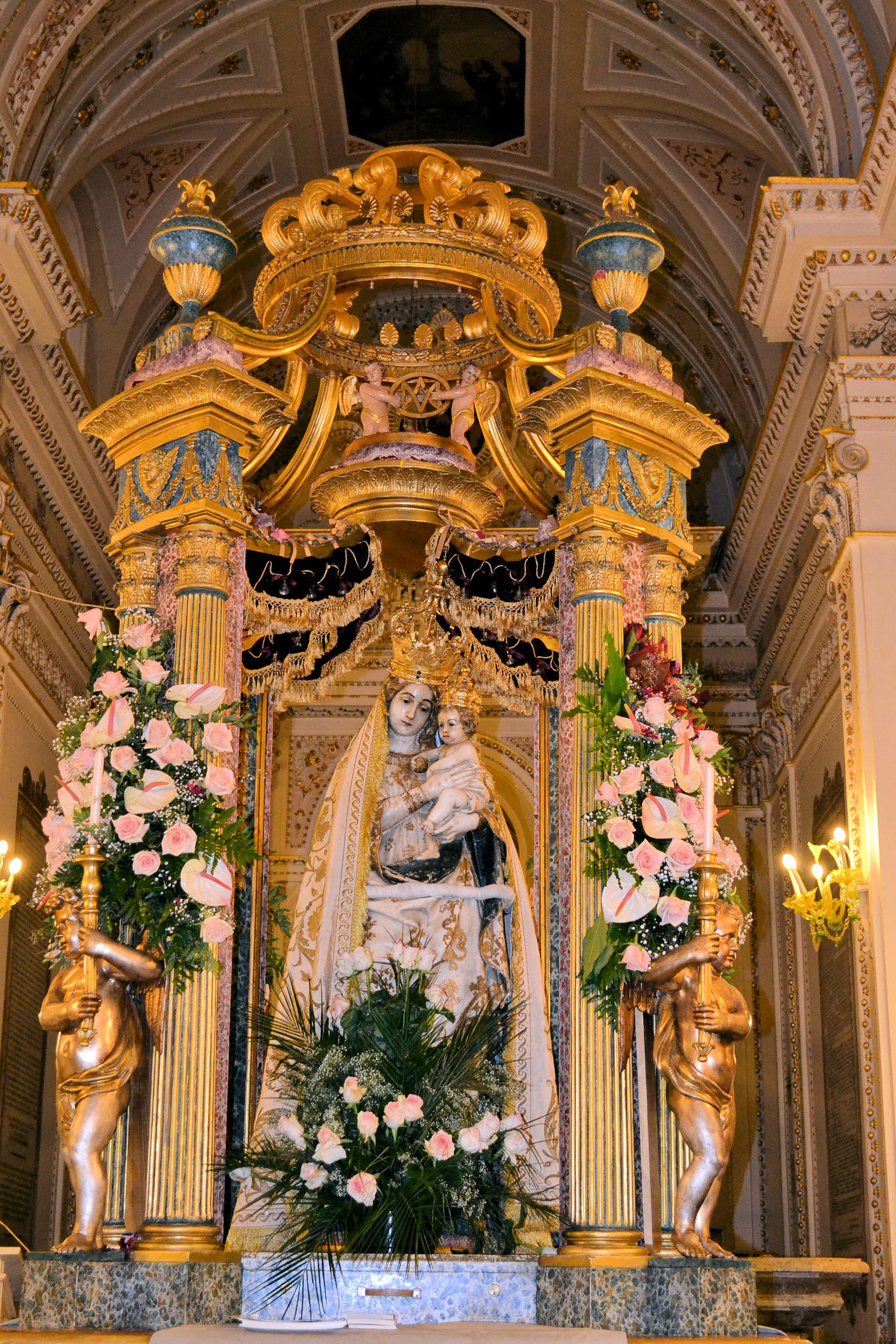 La statua della Madonna dell'Udienza all'interno del simulacro che la porta in processione per i quartieri di Sambuca di Sicilia, in provincia di Agrigento